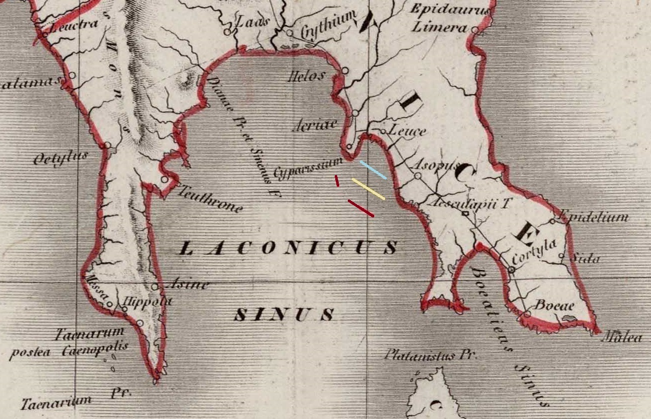 Batalha de Matapão II ― Fragatas Otomanas no Flanco (Esquema táctico simplificado) ―08h30: algumas fragatas otomanas tentam contornar a vanguarda cristã, para atacar a armada de remo. ― Vermelho: armada otomana. ― Azul: armada de remo cristã. ― Branco: armada de vela cristã. (Vento de SW)